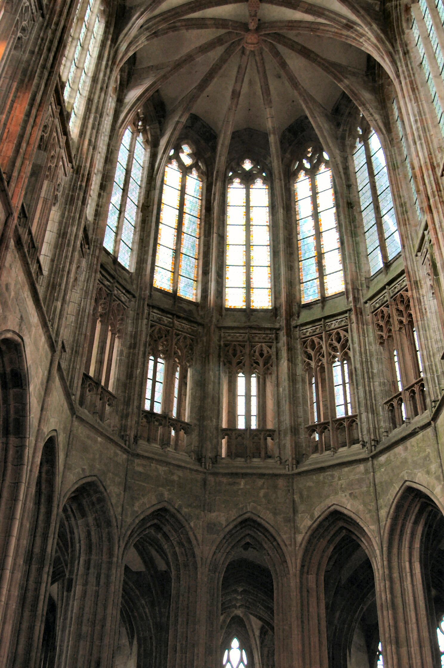 Intérieur de l'Abbaye - Mont Saint Michel